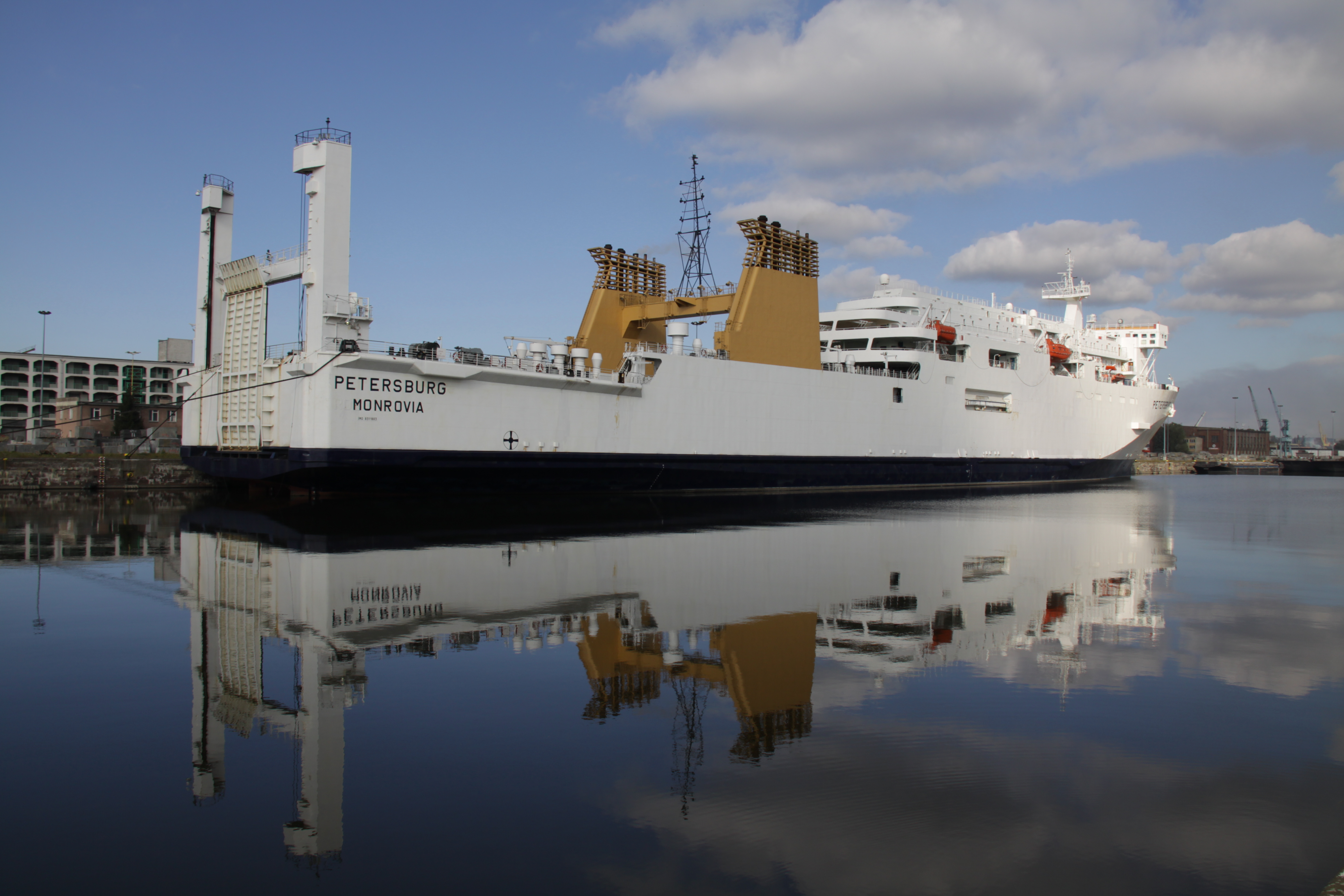 Железнодорожный паром "Петербург"